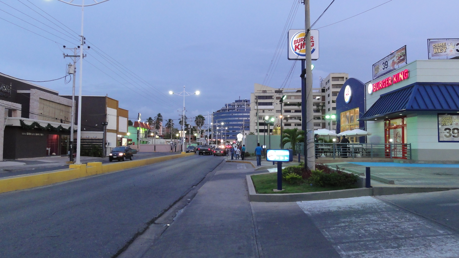 Casco Central, Lechería, Venezuela